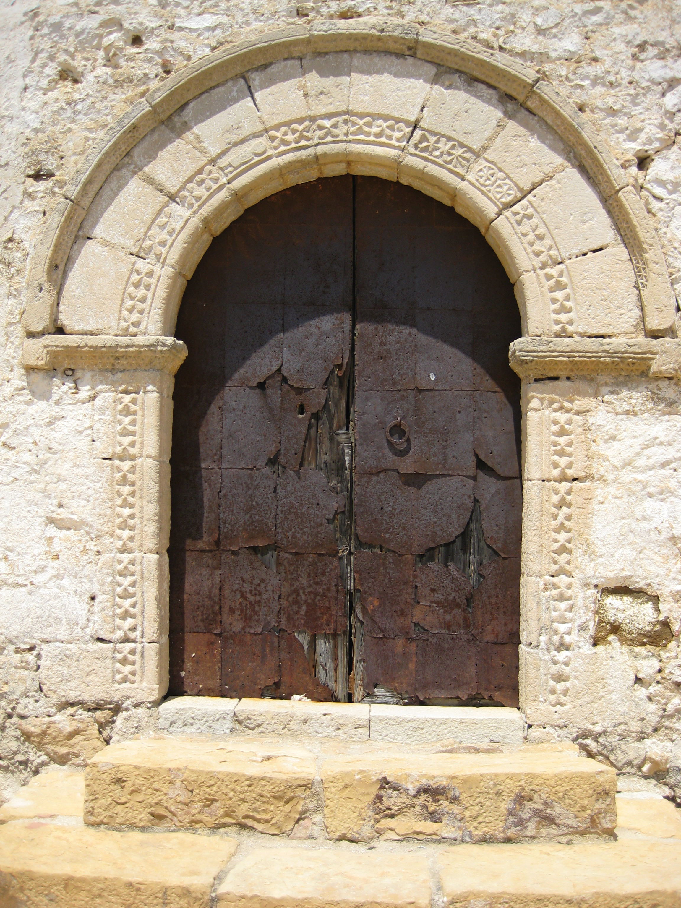 Porta romànica de l'església de Sant Jaume de Bel (Rossell, Baix Maestrat)